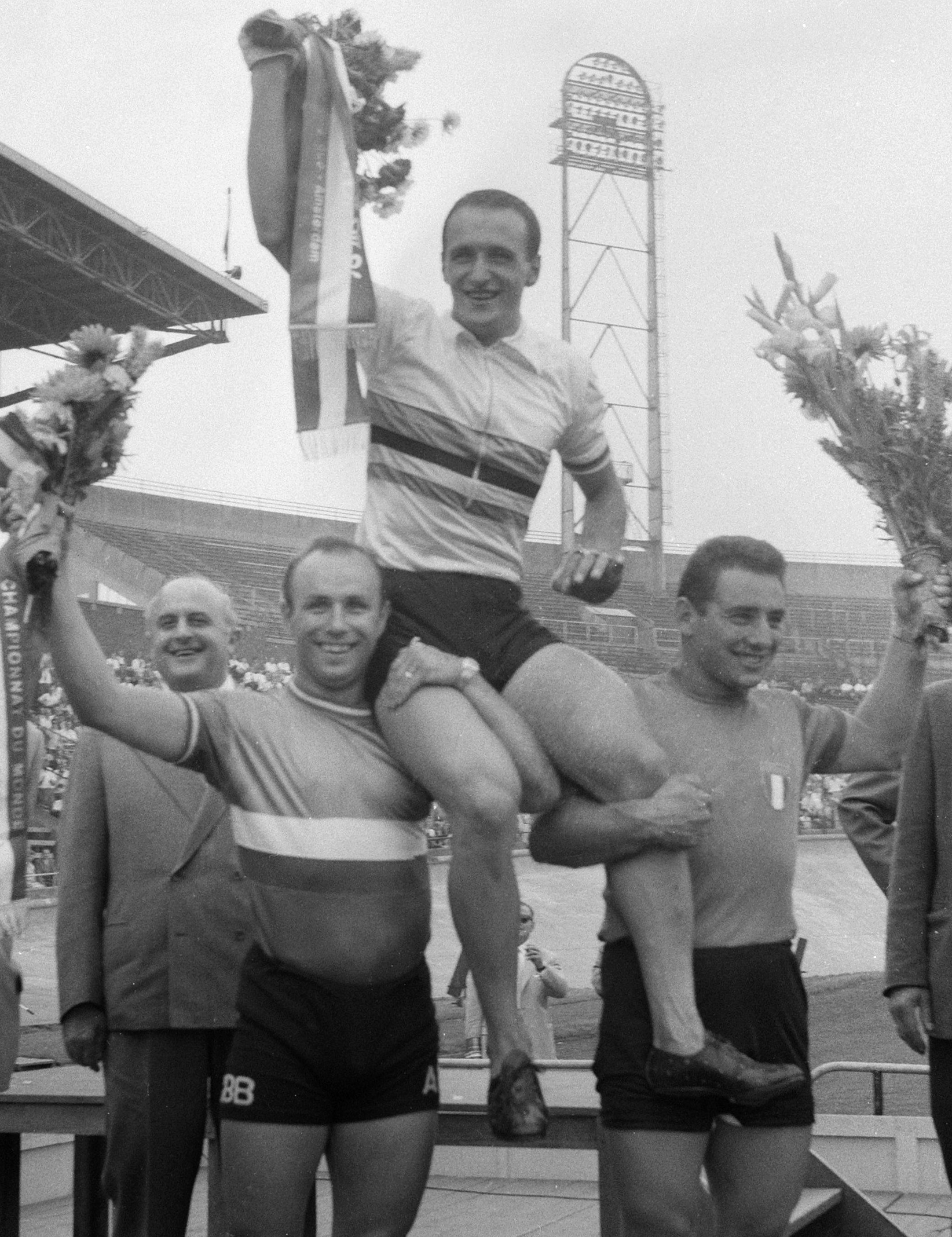 Wereldkampioenschap wielrennen op de baan in het Olympisch stadion te Amsterdam, v.l.n.r. Gruchet(Fr.), Gasparella en Gaiardoni